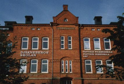 Västerås folkhögskola - sett från Ringvägen